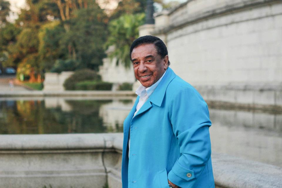 Ensaio realizado no Museu do Ipiranga em São Paulo - SP